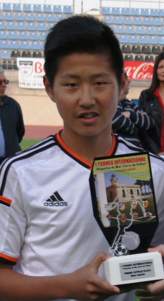 El jugador valencianista Kangin Lee rep un premi a un trofeu juvenil.